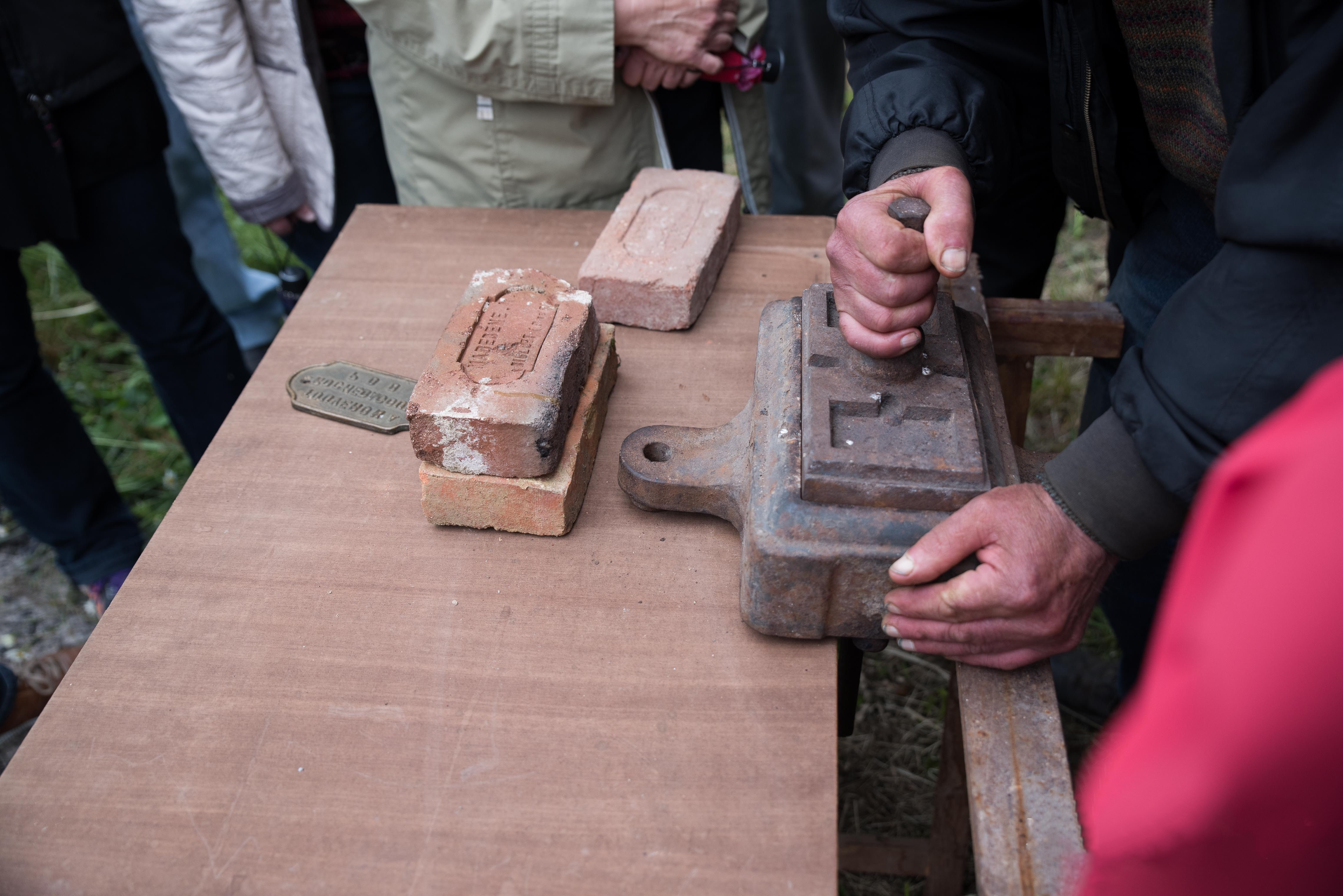 Modèle de moule à briques lors d'une visite organisée par la SMADC.